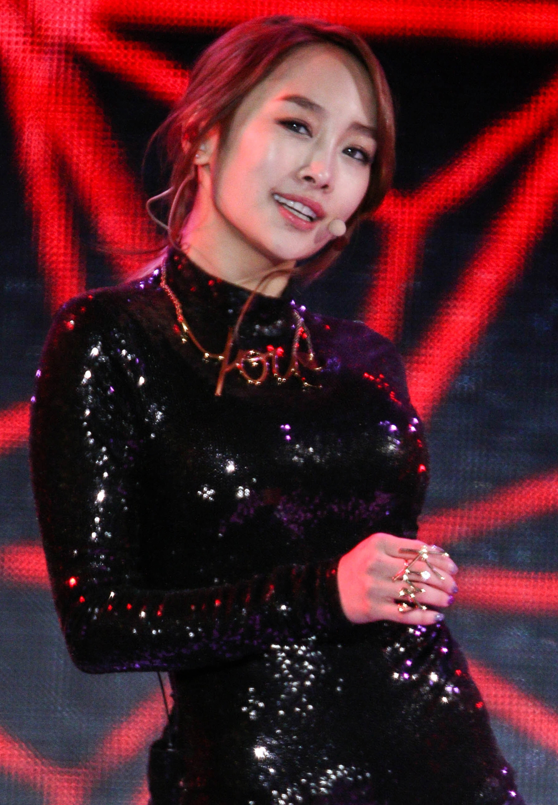 141211 니콜 더쇼 in 코엑스 야외무대